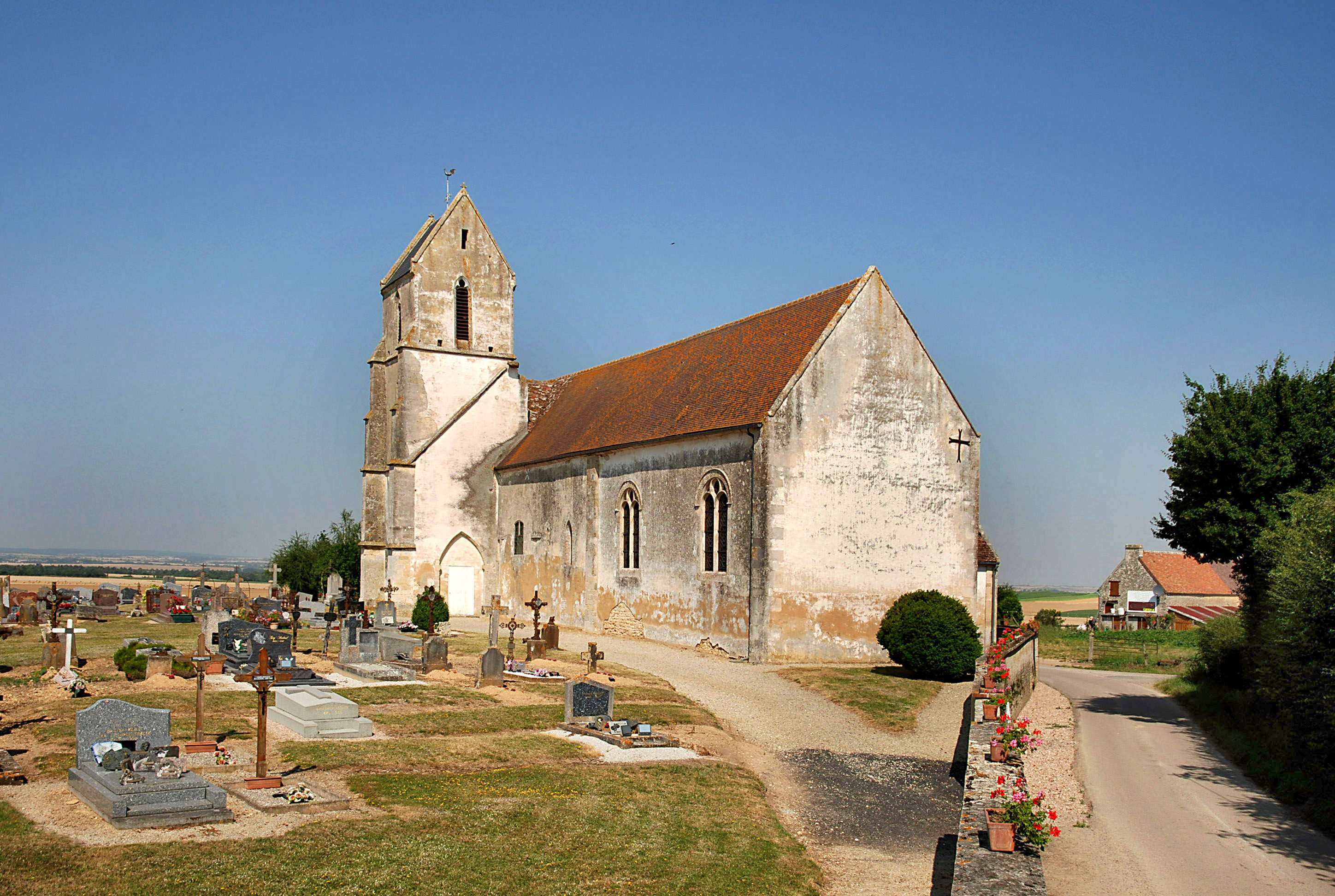 Les Moutiers-en-Auge (Calvados)